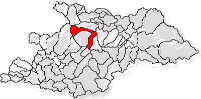 Ocna Şugatag (map)